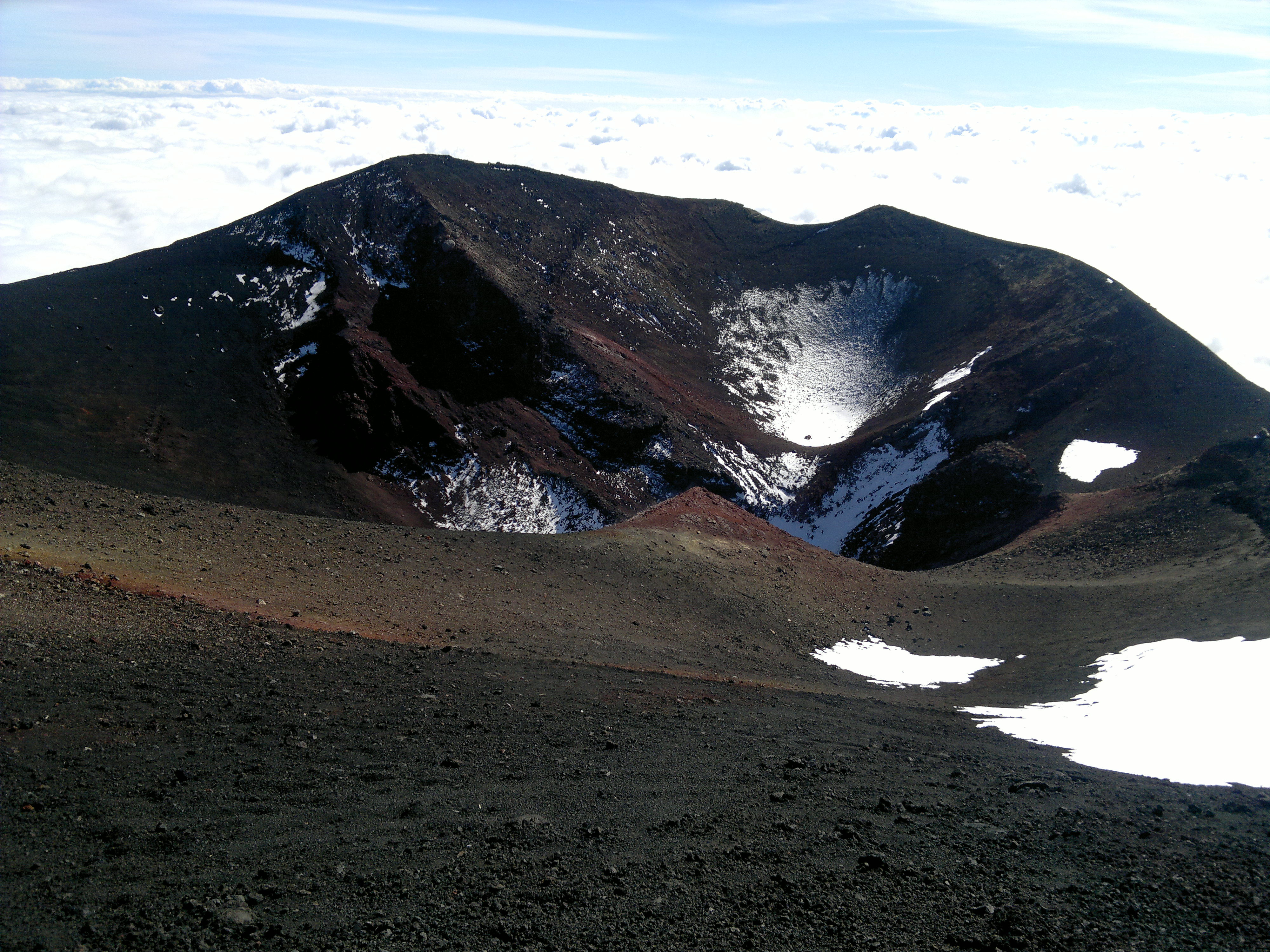 Этна. Кратер извержения 2002 - 2003 гг.